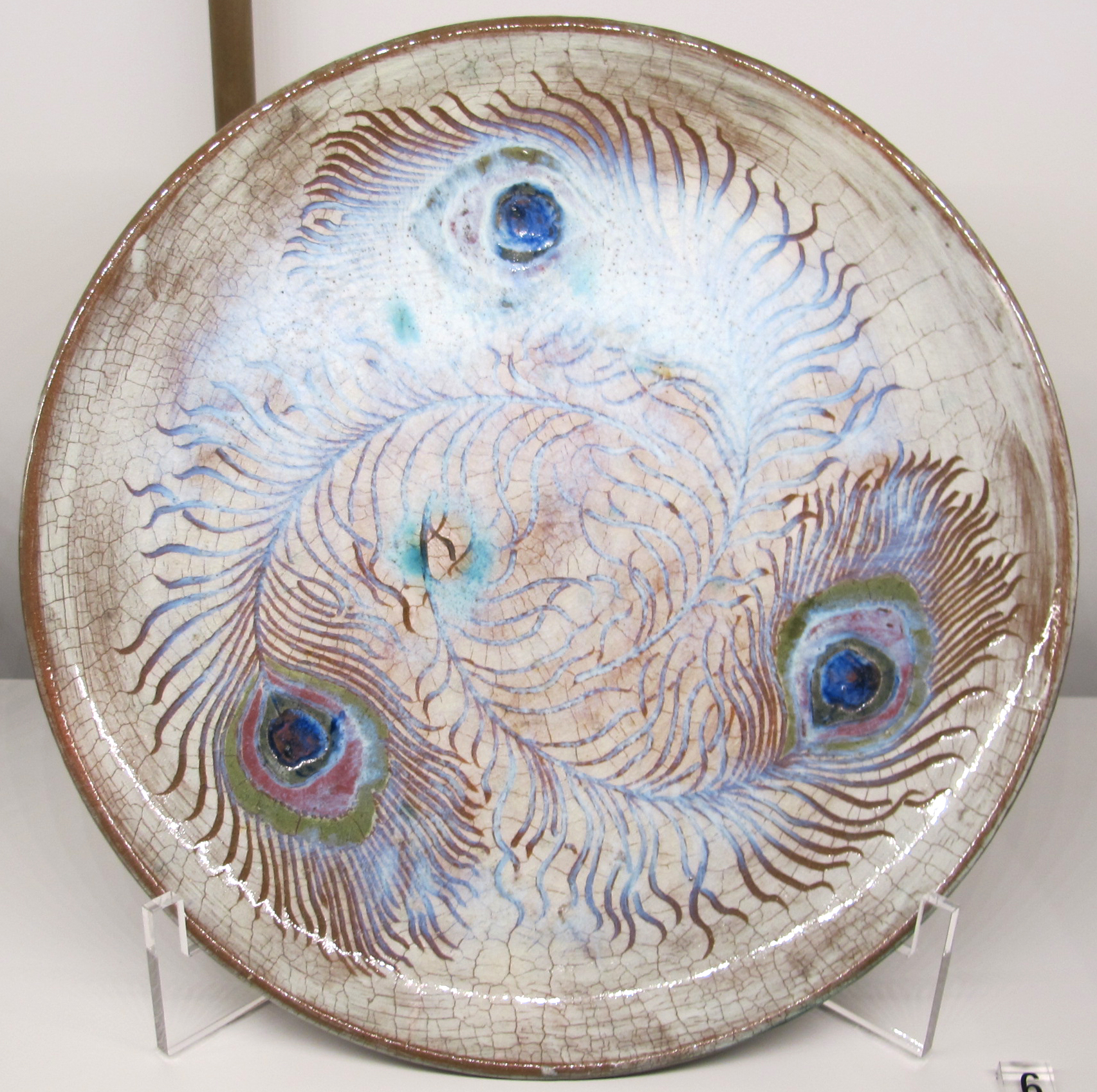 Auguste delaherche, piatto con occhi di pavone, parigi 1887-1894 ca.